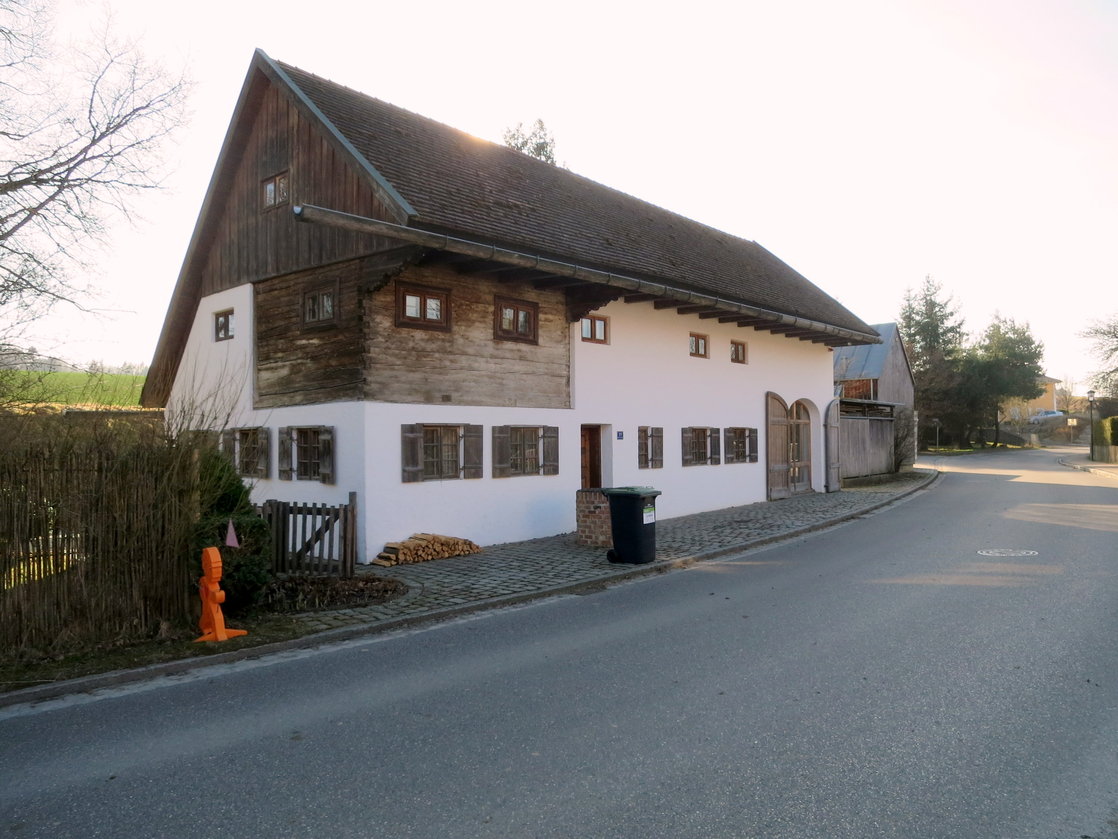 Das Kleinbauernhaus ist heute ein Wohnhaus